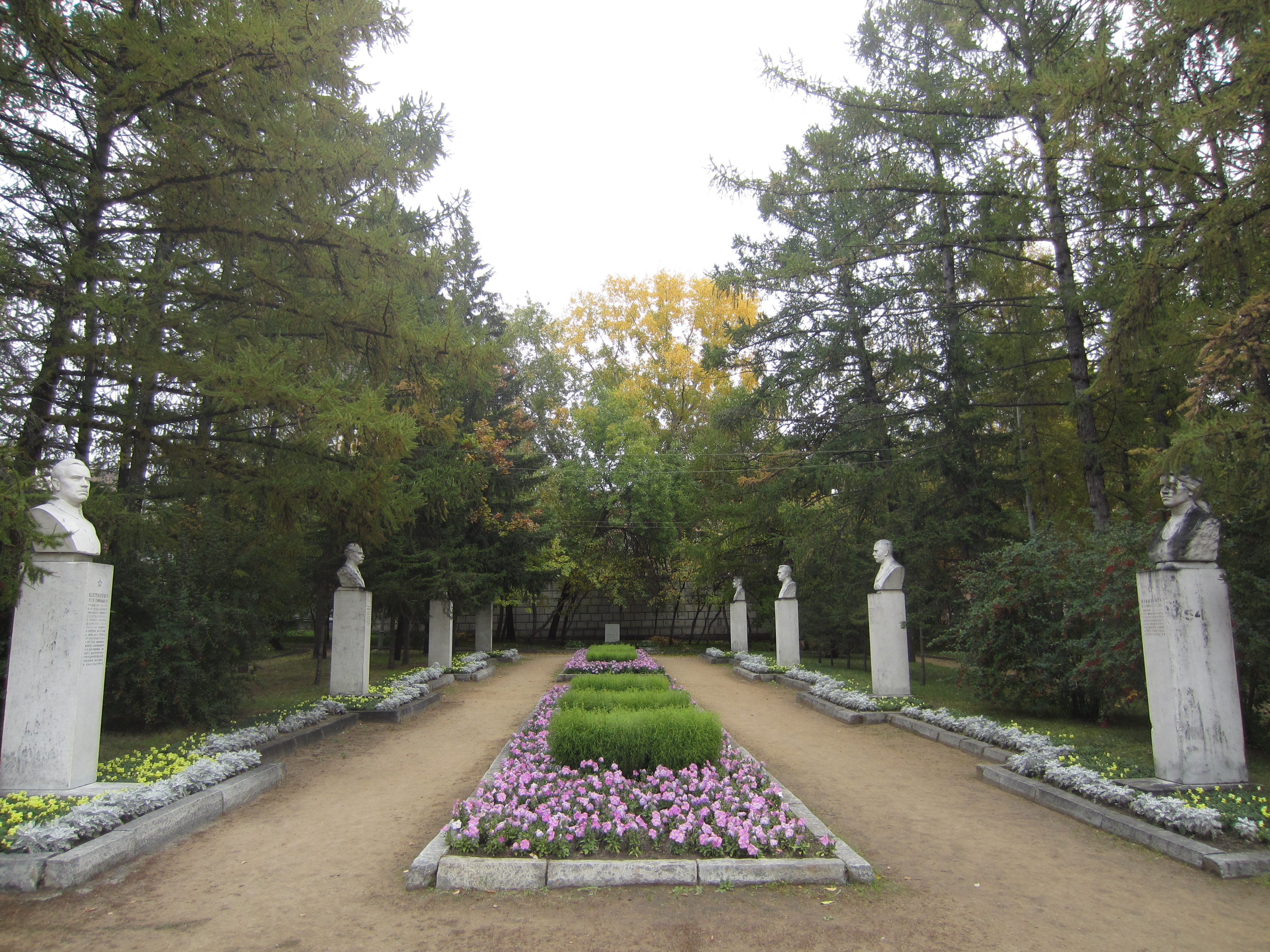 Мемориальный сквер павших в годы Гражданской войны: Красный проспект, 32, Центральный район, Новосибирск, Новосибирская область